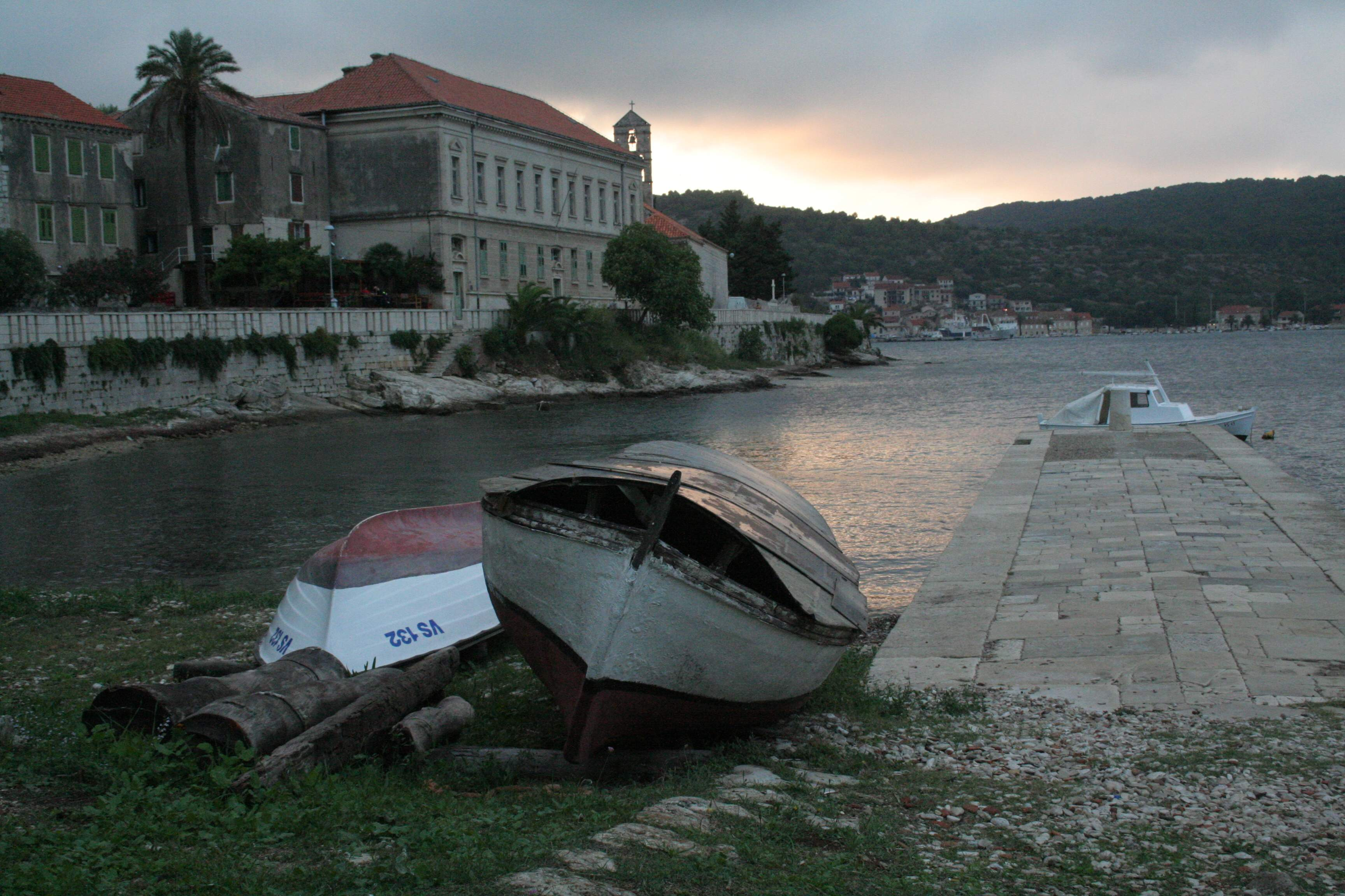 Vis Ort, Abendstimmung